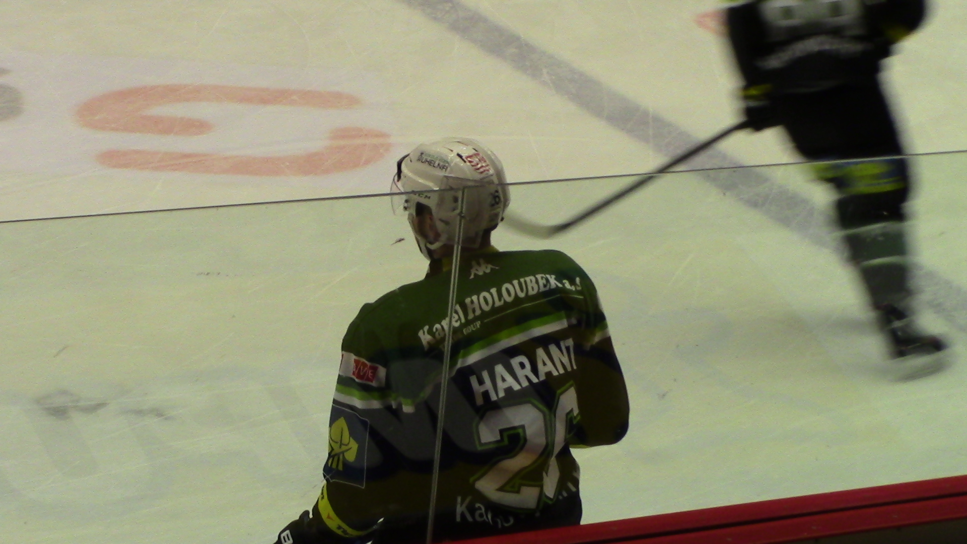 Harant